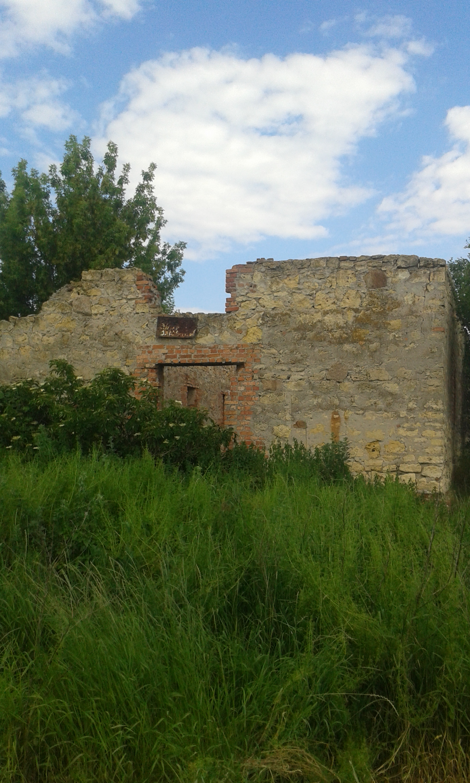 м.Підгороднє, вул.Залізнична, 452